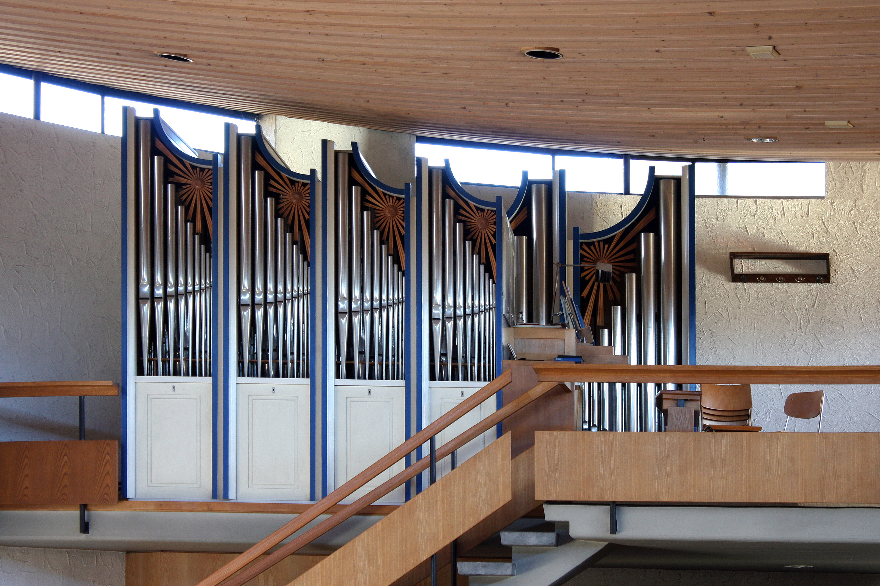 Römisch-katholische Pfarrkirche Maria Krönung Gossau ZH, Orgel